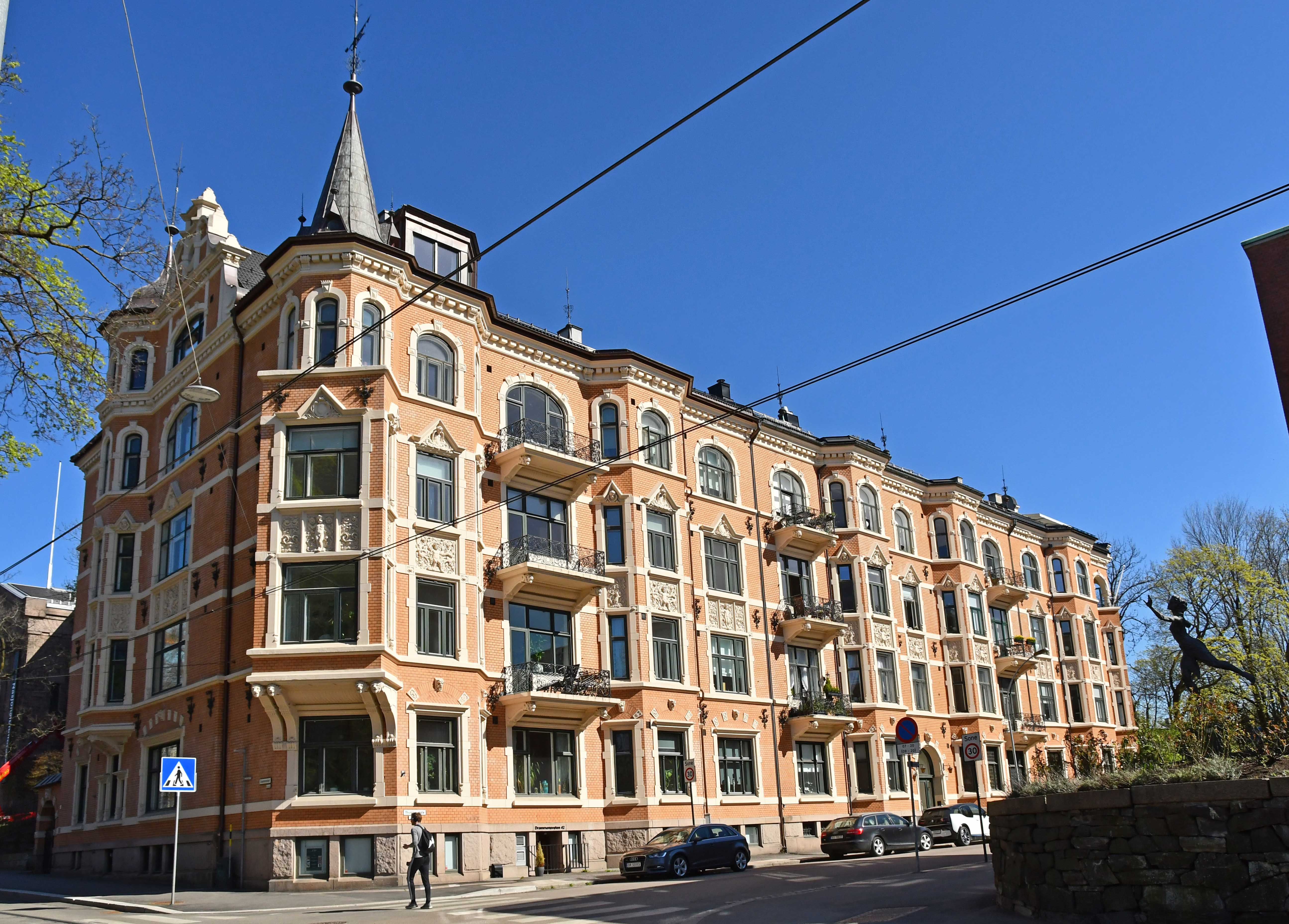 Sverregården, arkitekt Ole Sverre, bygget 1894 til 1898, Drammensveien 44B og Thomles gate 4 og 6, her sett fra Drammensveien på nedsiden av gården